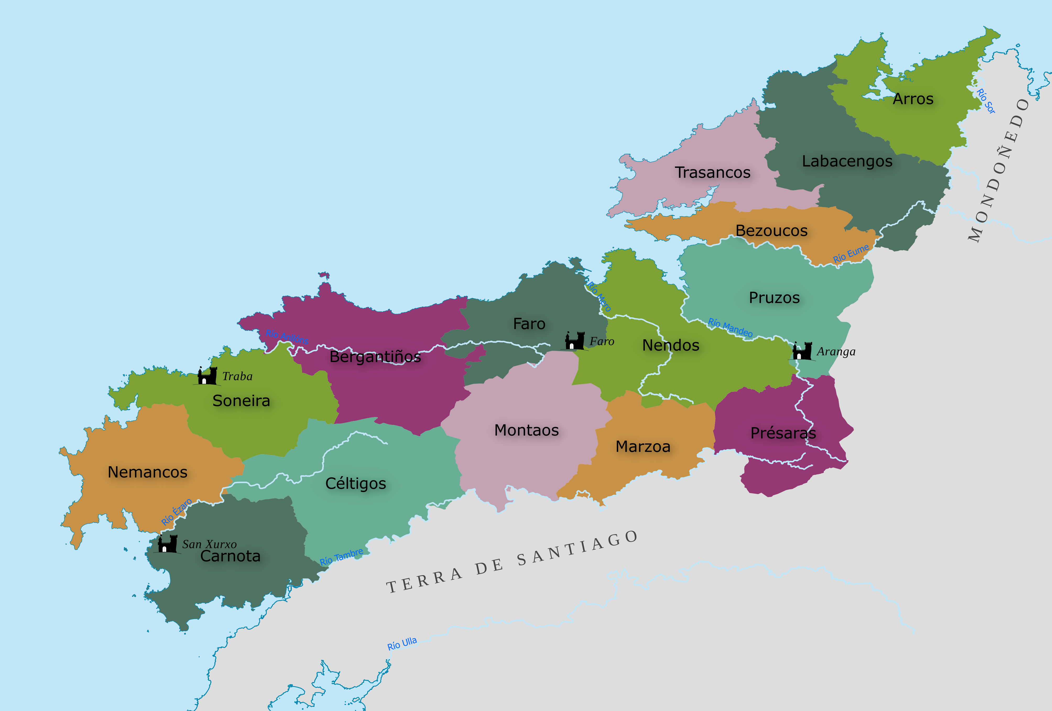 Territorio de Trastámara (Galiza) coas súas terras e castelos.[1][2]